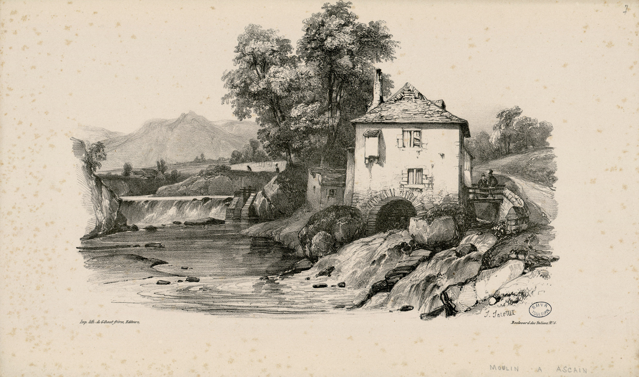 Pl. non légendées dans le texte, mais notes ms. : hypothèse de localisation Ancely, René (1876 - 1966). Possesseur